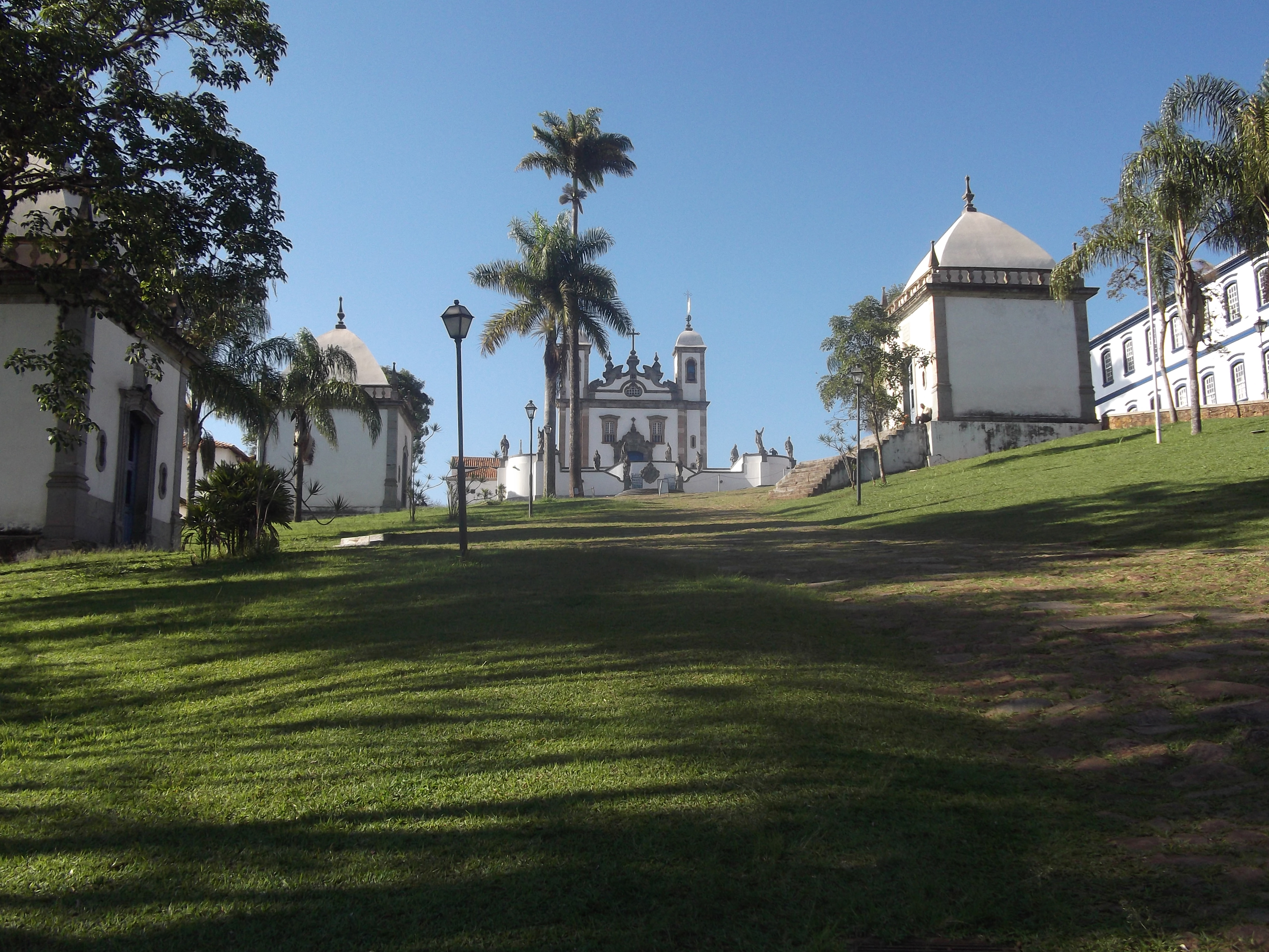 Santuário do Bom Jesus de Matosinhos